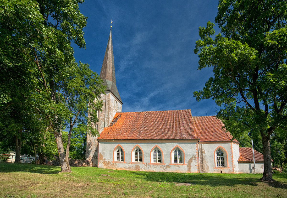 Jaunpils luterāņu baznīca, Jaunpils